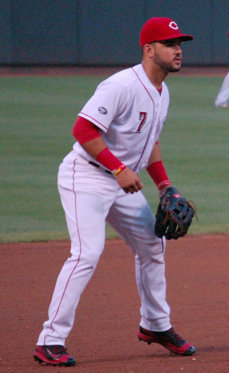 Eugenio Suárez